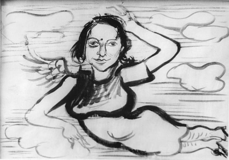 Zentralbild Ulser 17.1.1959 25. Kunstaustellung der Deutschen Bücherstube Am 17.1.1959 wurde in den Räumen der Deutschen Bücherstube in Berlin, Freidrichstrasse, die 25. Kunstaustellung unter dem Titel "Der unbekannte Hans Grundig" eröffnet. Die Ausstellung wird bis zum 14. Februar d. Jahres geöffnet sein und Gemälde, Aquarelle und Zeichnungen des verstorbenen Künstlers zeigen. UBz: Porträt Lea - 1928. Tuschezeichnung.